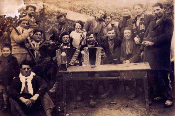 imigrés italiens d'Orgenoy, années 30